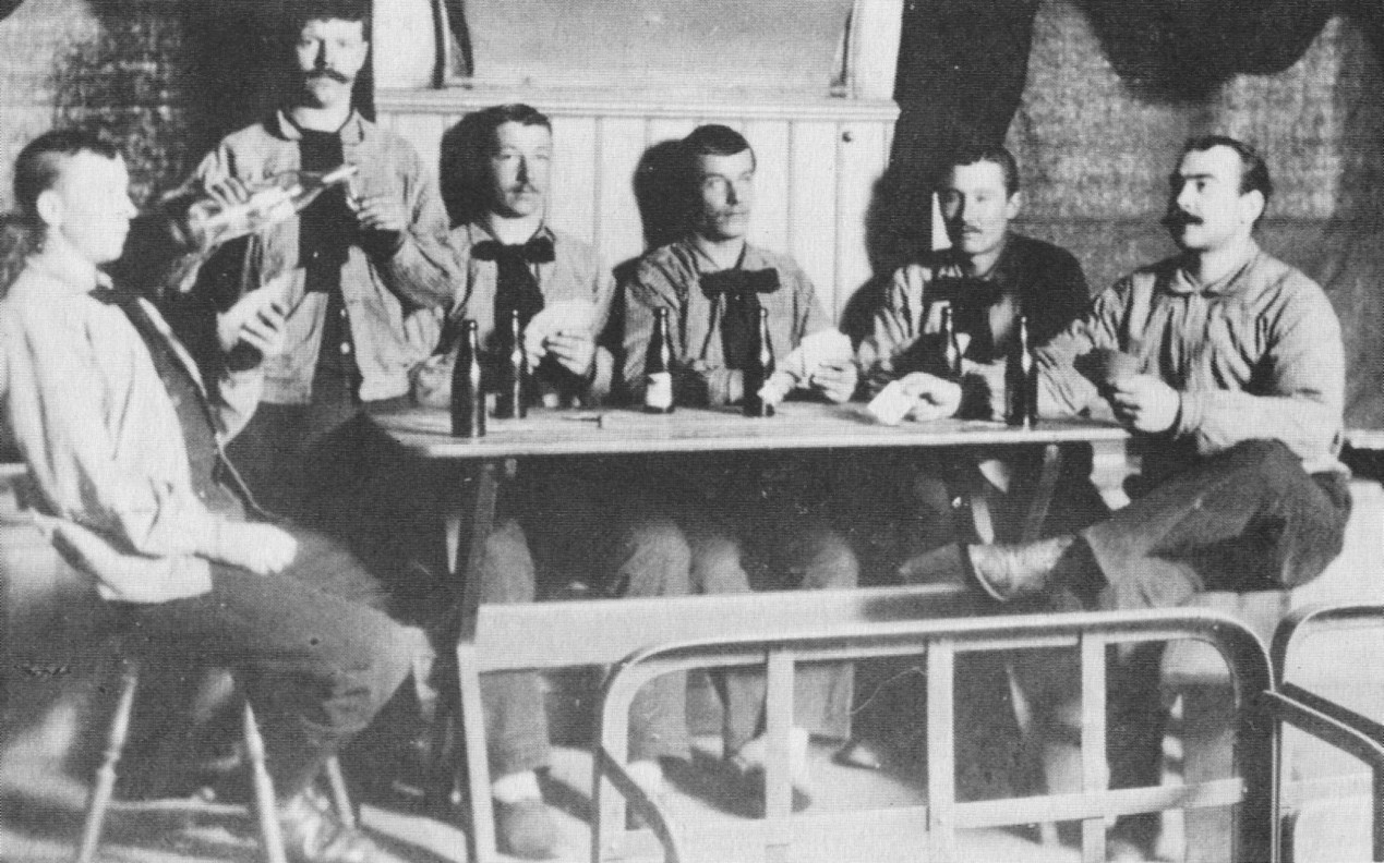 Bondeska palatset med Rådstugans brandstation (personalen har fest)